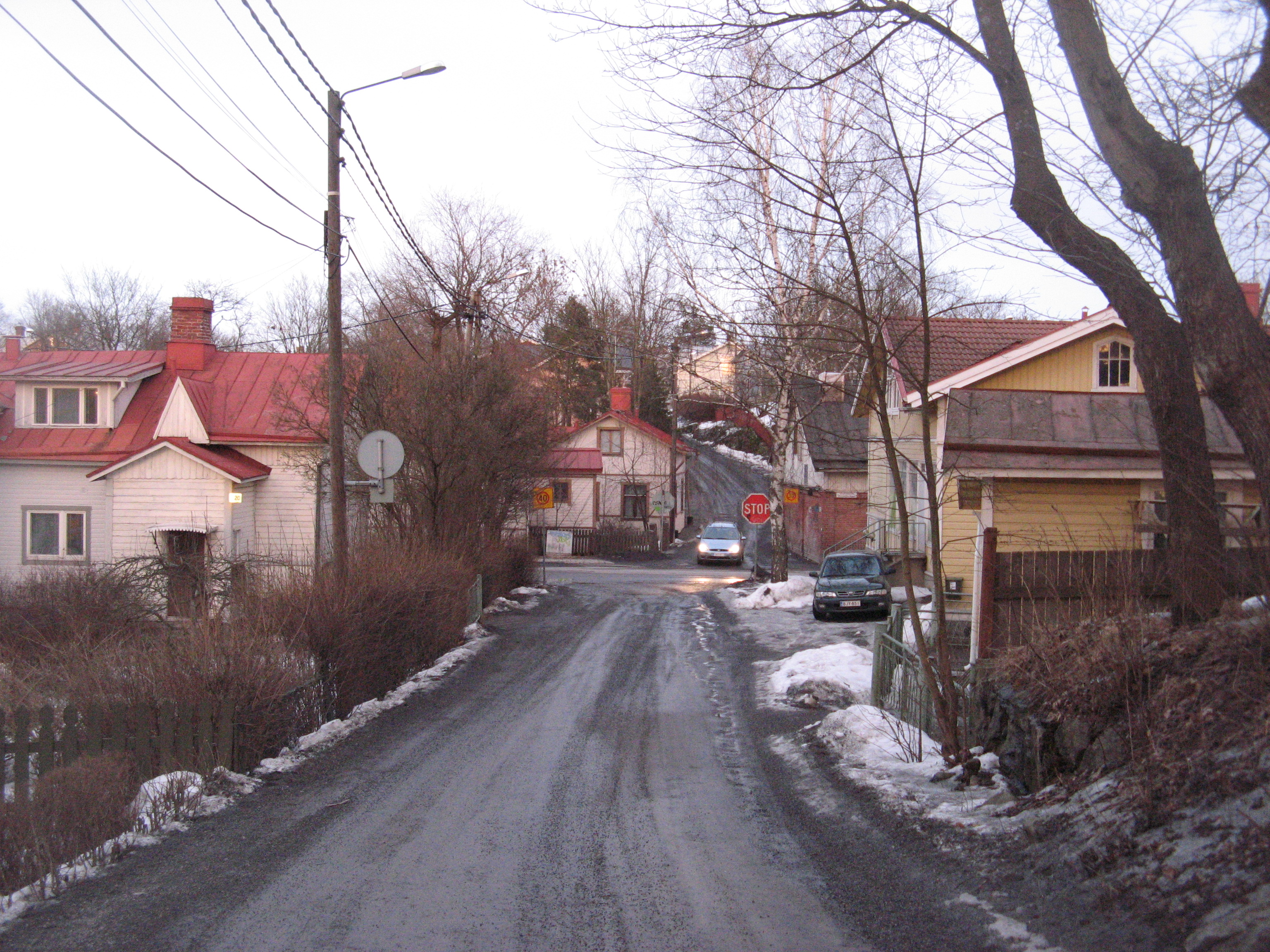 Murtomaantie Raunistulassa keväällä 2009